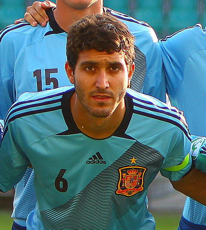 José Campaña avec l'équipe d'Espagne de football des moins de 19 ans en 2012.